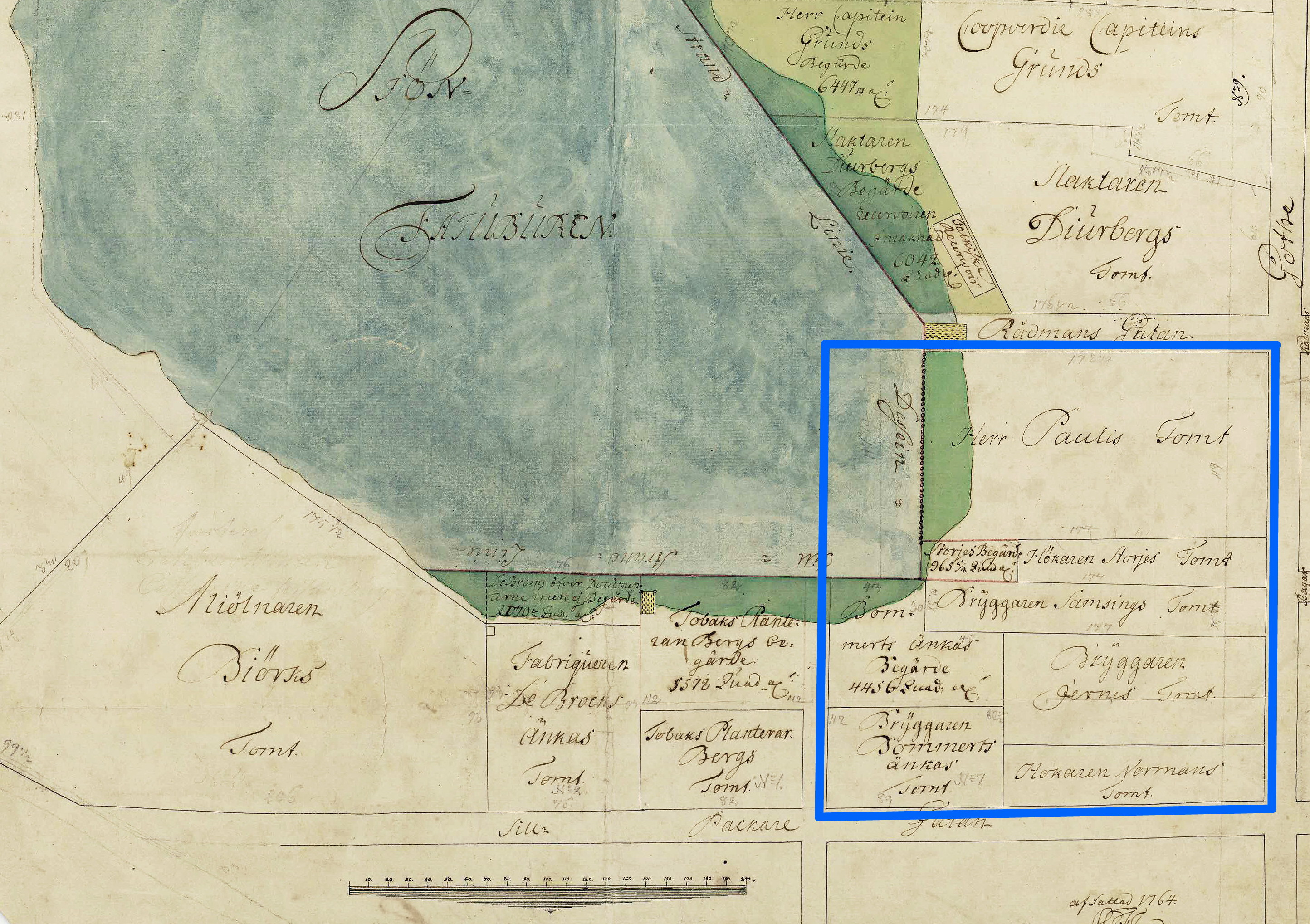 Fatburssjön med tomtägarna runt sjön och "En dessein (ritning) till strandlinie" som aldrig utfördes. Det framtida kvarteret Bryggaren (idag Nattugglan)är inritad med blå.